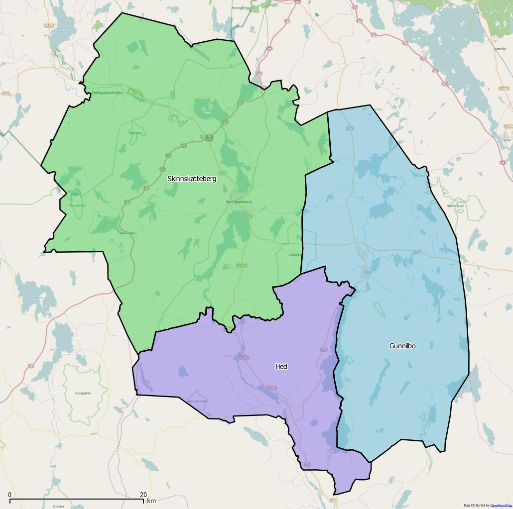 Distriktsindelningen i Skinnskattebergs kommun World file: 74.40755535269707366 0 0 -74.40755535269707366 1710728.90250951005145907 8392068.37297081761062145